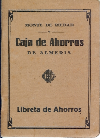 Libreta del Monte de Piedad y Caja de Ahorros de Almería hacia los años 50. Imagen de documento digitalizado de Archivo Familiar.